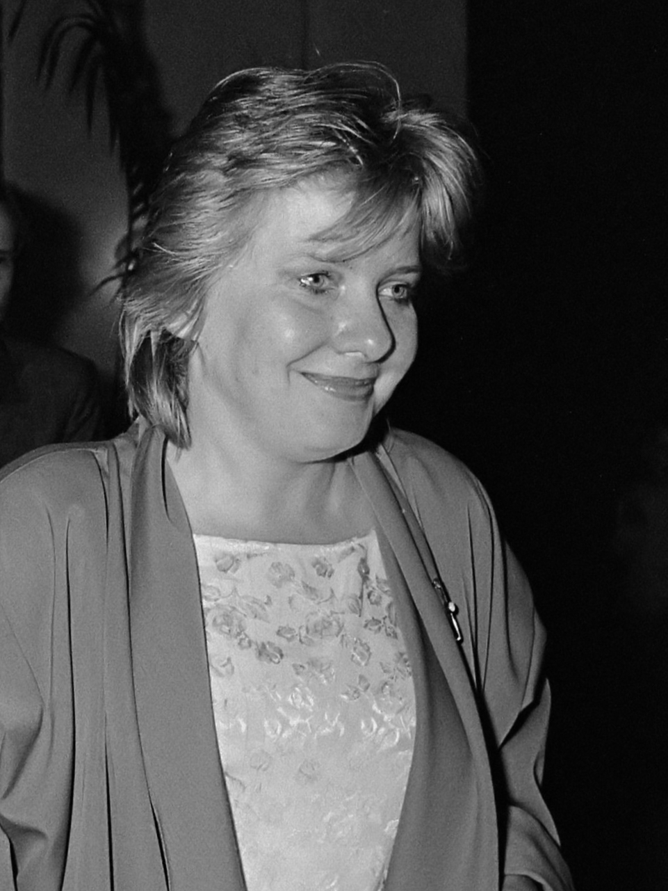 Vonne van der Meer (r) krijgt Geert Jan Lubbenhuizenprijs van Marten Toonder (l) in Nieuwe Kerk te Amsterdam 1 mei 1986